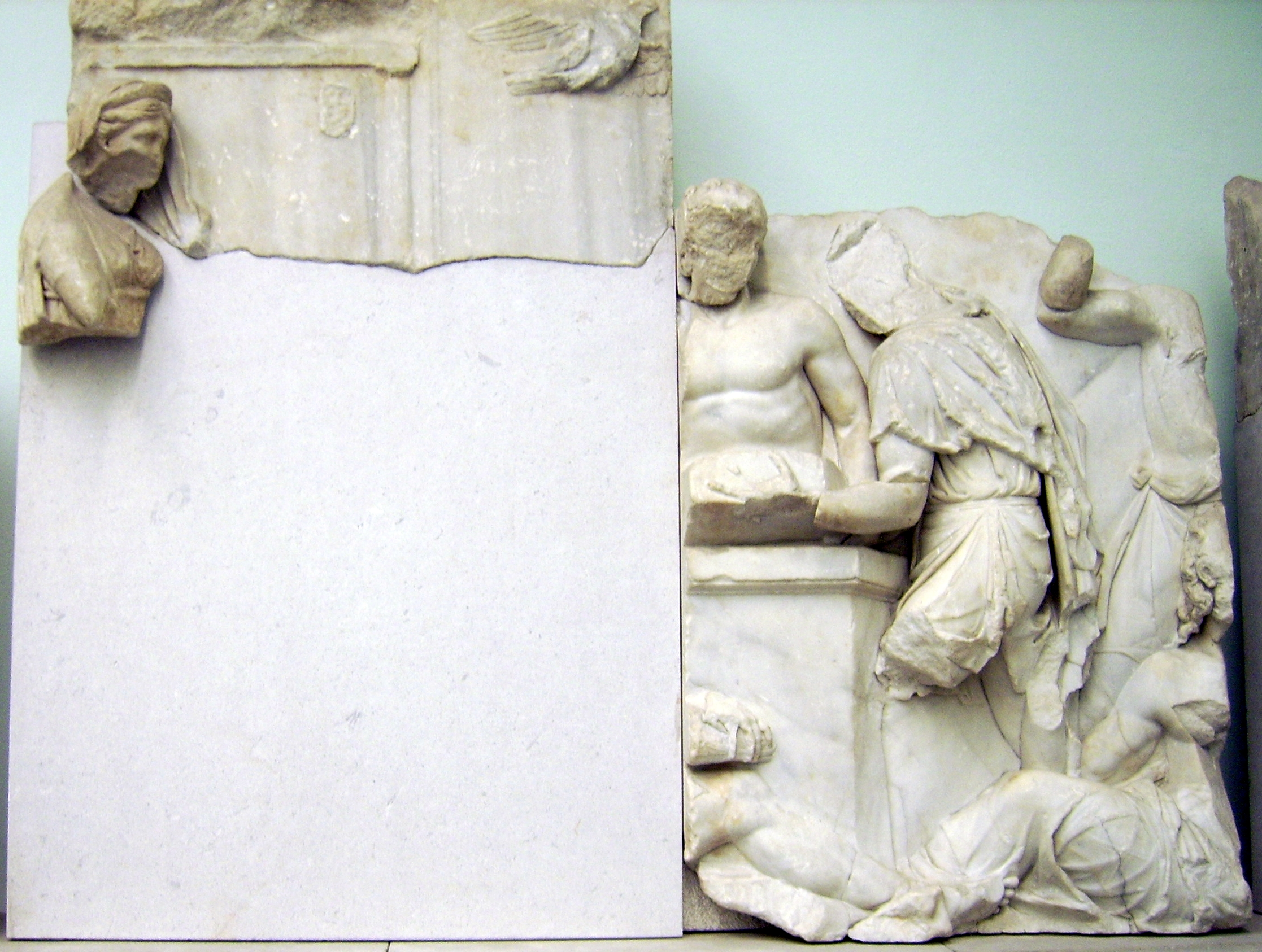 Platten 49 und 50: Gründung Pergamons.